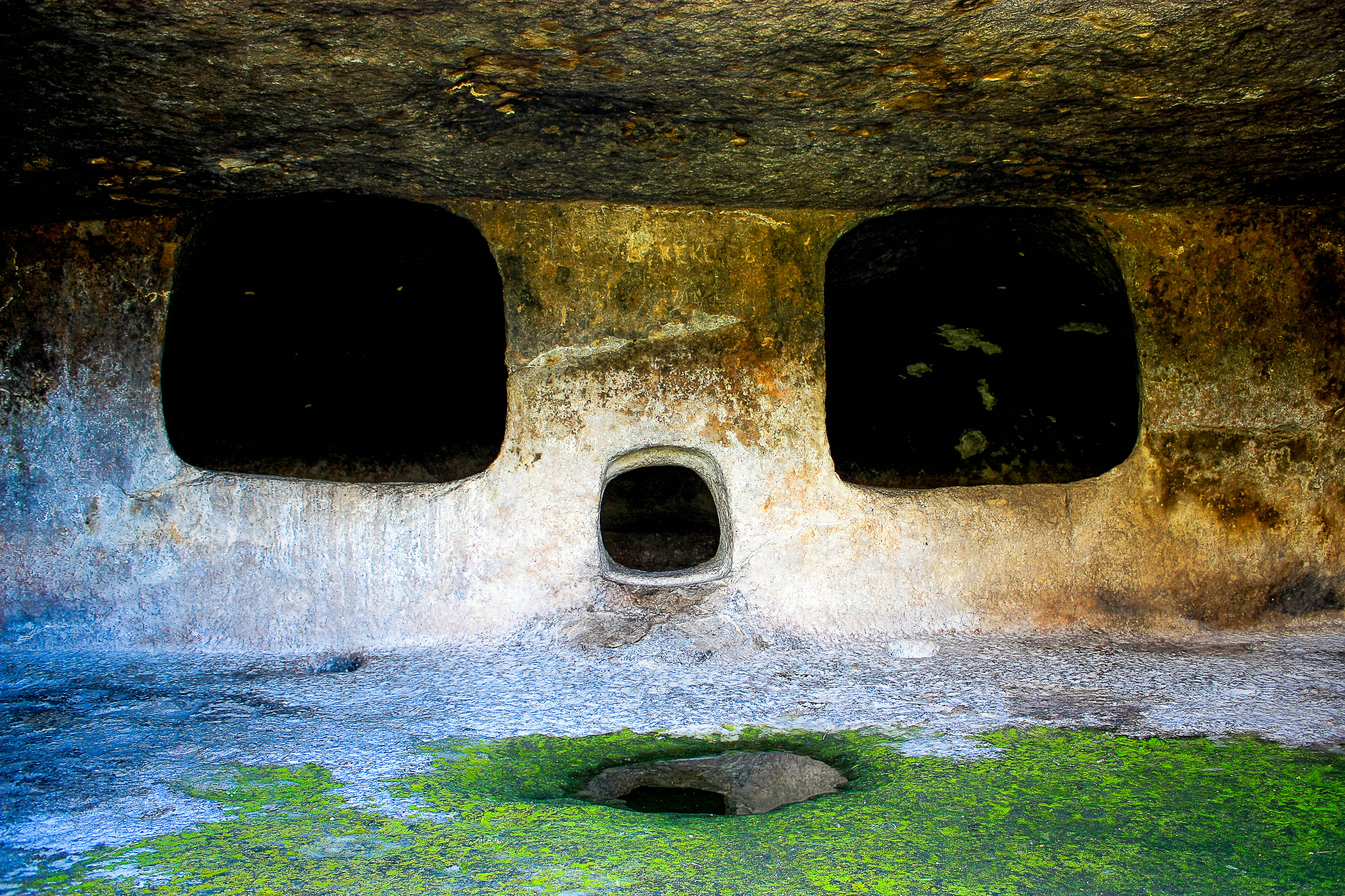 Necropoli di Montessu - MIBAC This is a photo of a monument which is part of cultural heritage of Italy.